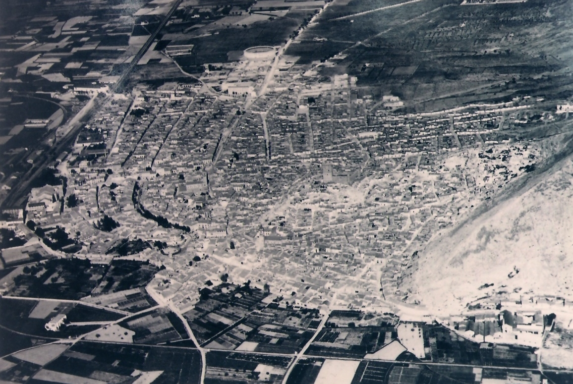 Vista aérea de Villena en 1933, dirección S-N. Se distingue a la derecha la mole de la Sierra de la Villa, sobre cuyas faldas se extiende el casco antiguo, en el centro del cual se eleva el Castillo de la Atalaya. Al sur, entre los cultivos, se distingue la línea del tren VAY; más al norte, bajo el castillo se distingue la iglesia de Santa María, y algo al NO la de Santiago. A la izquierda de ésta se ve el arbolado de la Calle Corredera y, más a la izquierda, el Teatro Chapí, el parterre y las estaciones de ferrocarril. Al norte se extiende la parte nueva de la ciudad, con un plano más radial y vertebrada en torno a la calle de San Sebastián (actual avda. Constitución). Al final del casco urbano se sitúa el conjunto de la iglesia María Auxiliadora y el colegio de Salesianos, ante el que todavía se ve la ermita de San Sebastián, y, en el límite norte, la plaza de Toros, inaugurada en 1924.